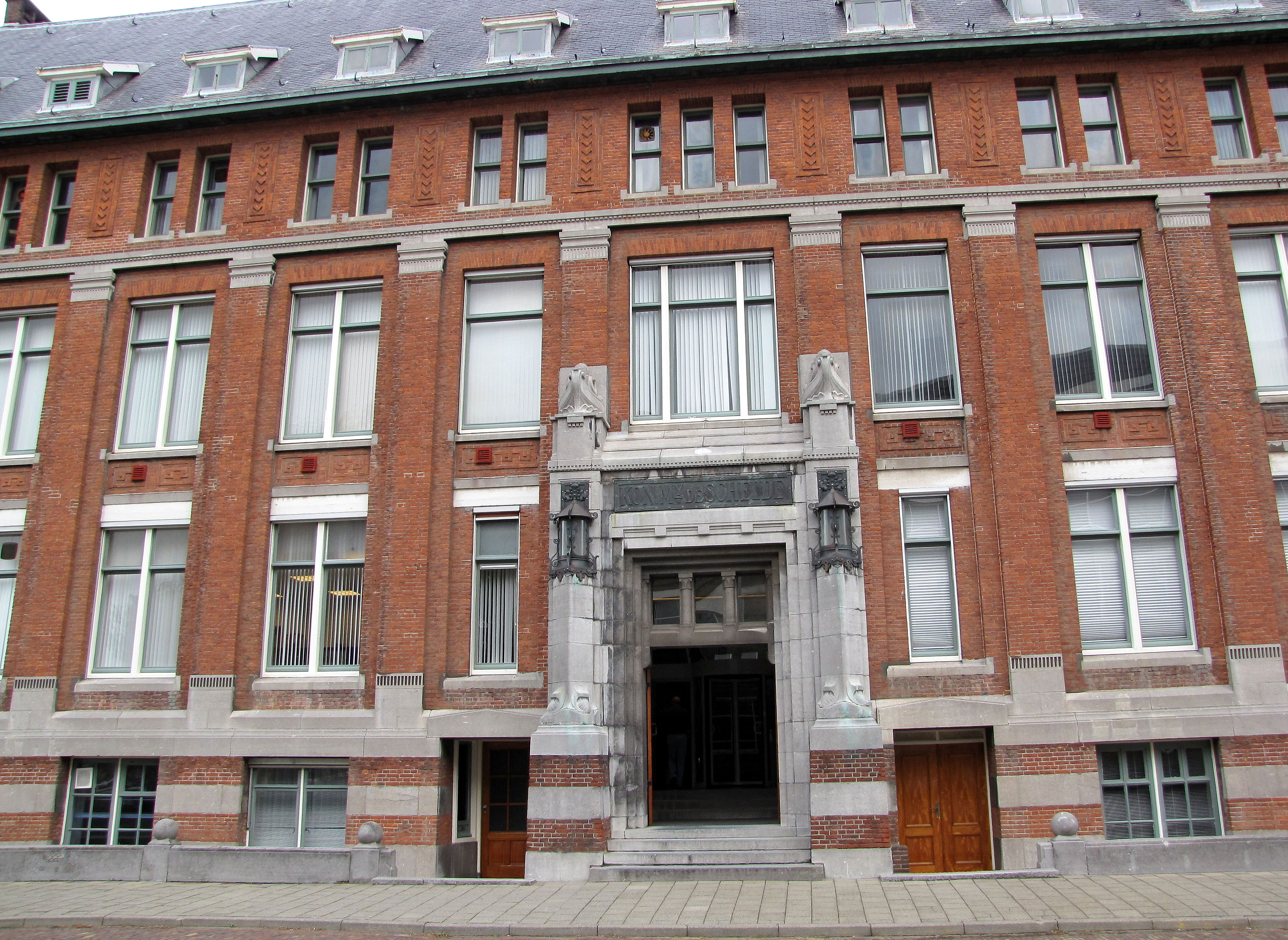 Hoofdkantoor van de Koninklijke Maatschappij De Schelde (KMS) aan de Glacisstraat 165 te Vlissingen (1913)